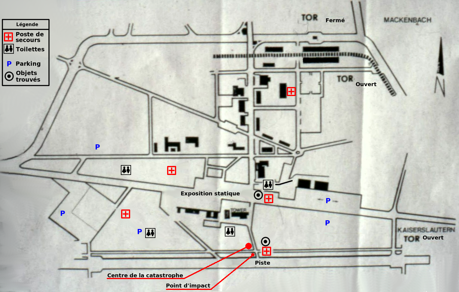 Situation de l'accident sue le plan de la base de Ramstein.